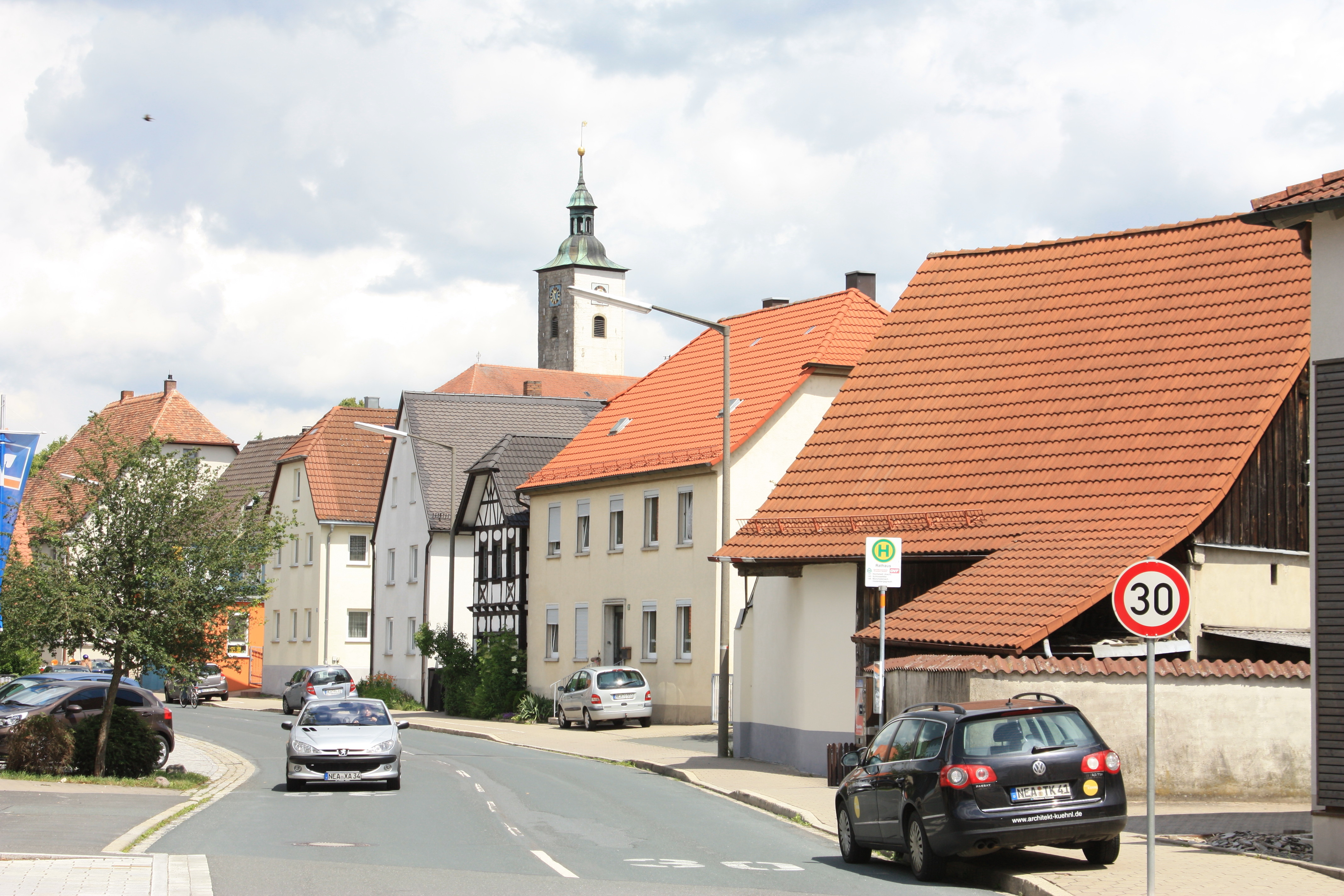 Ortsmitte